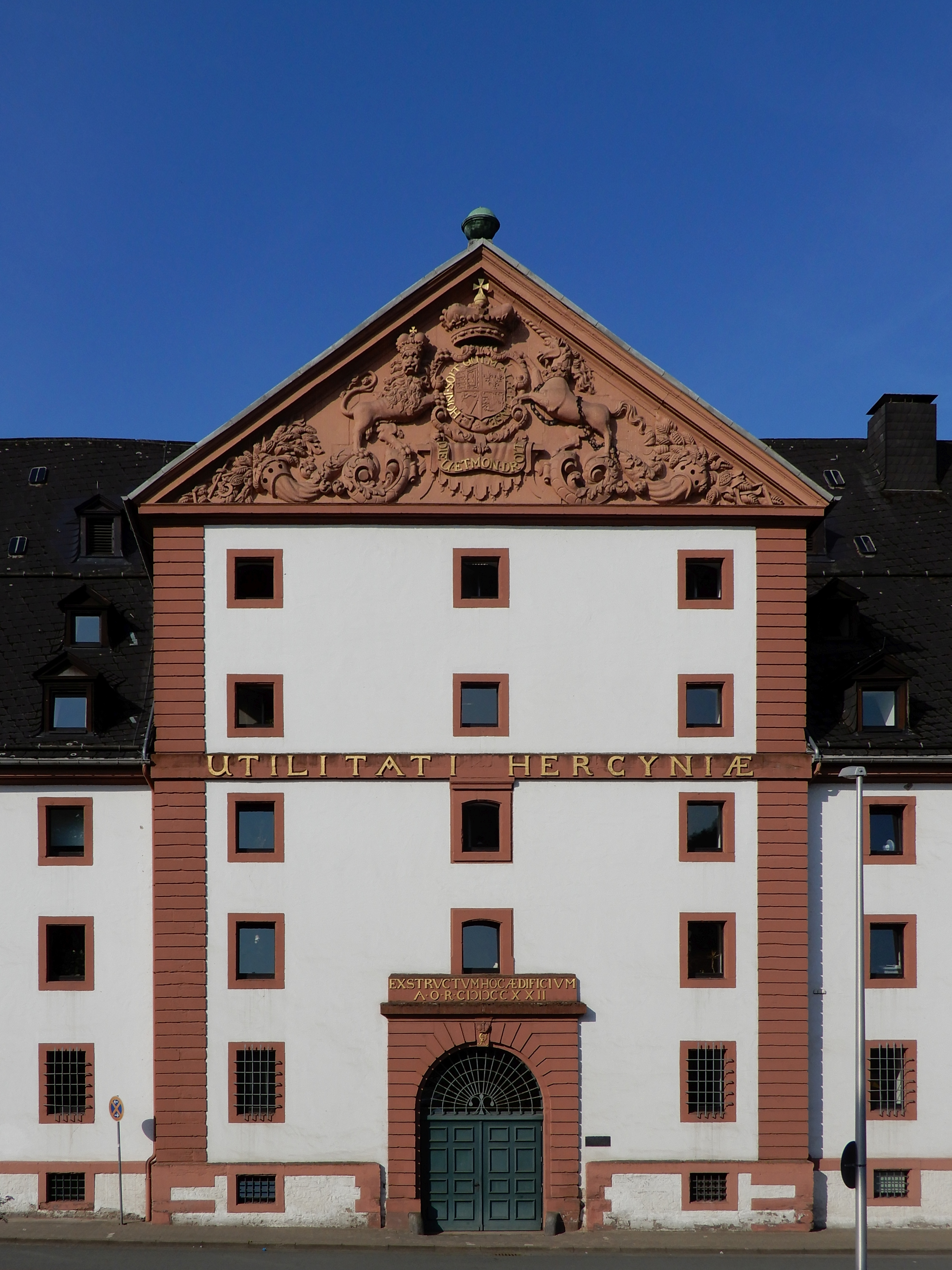 Das Harzkornmagazin in Osterode am Harz, seit 1989 als Rathaus der Stadt genutzt. Portal